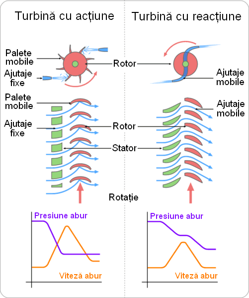 Diagramă comparativă a turbinelor cu acţiune şi reacţiune. Tradus din File:Turbines_impulse_v_reaction.png